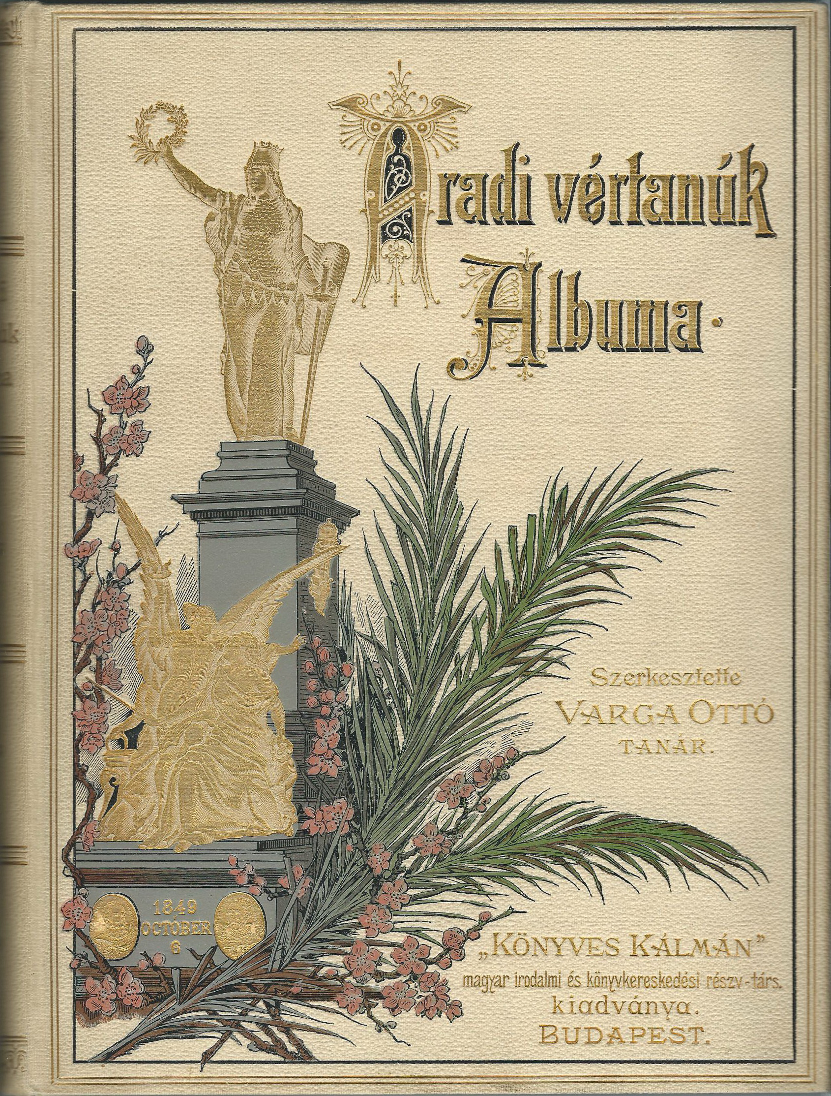 Az Aradi vértanúk albuma 1893-as negyedik kiadásának címlapja